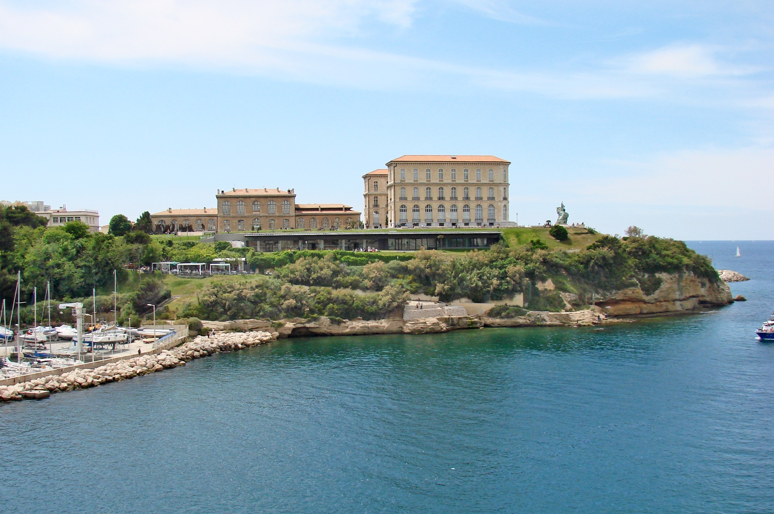 Le palais du Pharo domine l'entrée du Vieux-Port Photo Annie Dalbéra Article de Wikipedia